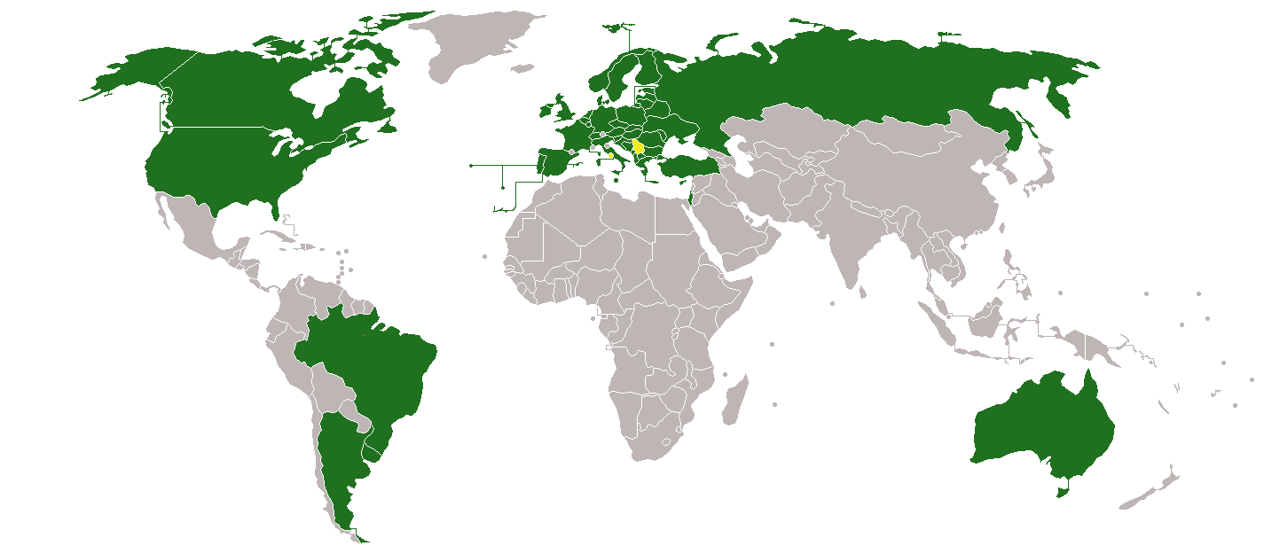 Terezin declaration